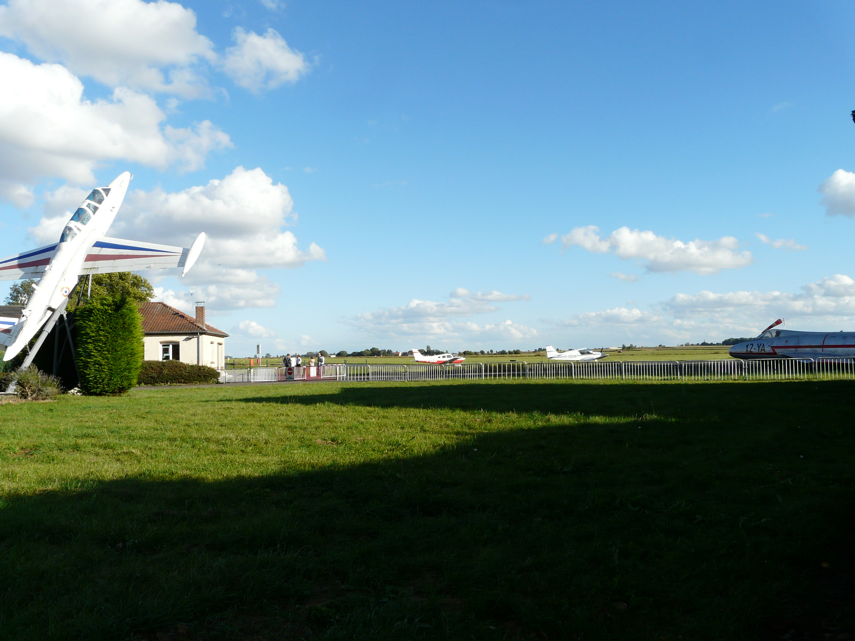 L'aéroclub Louis-Blériot de Niergnies (Nord)